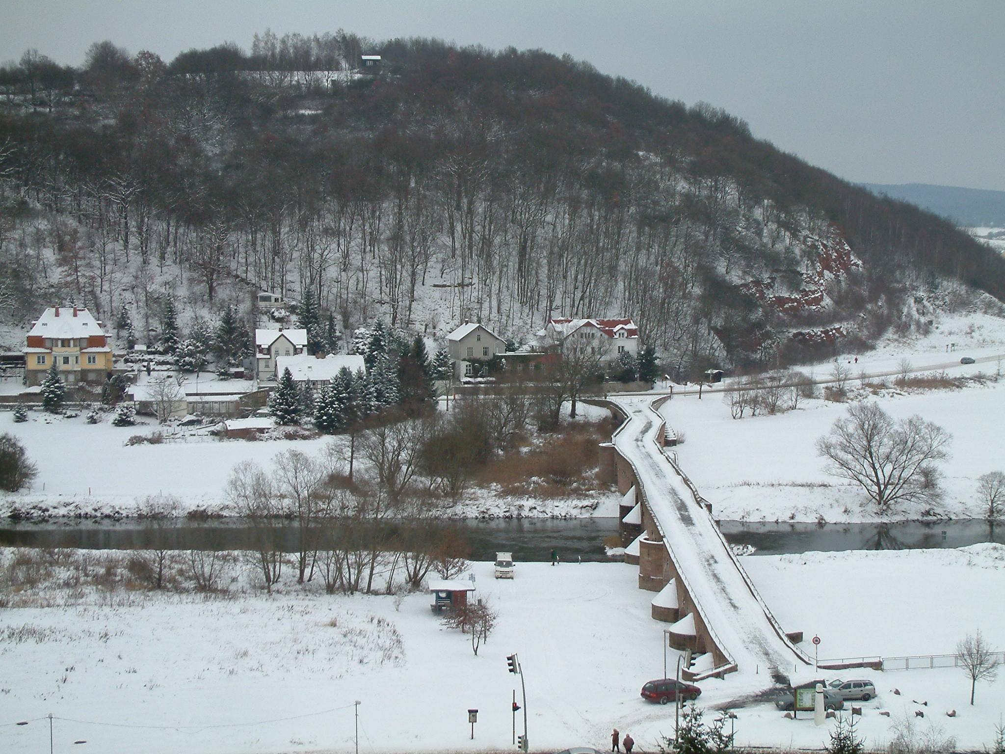 Blick vom Kirchturm der Stadtkirche Vacha nach Norden über die Werrabrücke zum Siechenberg bzw. zum "Haus auf der Grenze" und einem Teil von Weidenhain. Deutlich sind die beiden Knicke im Bauwerk zu sehen, welche die beiden alten Brücken markieren.